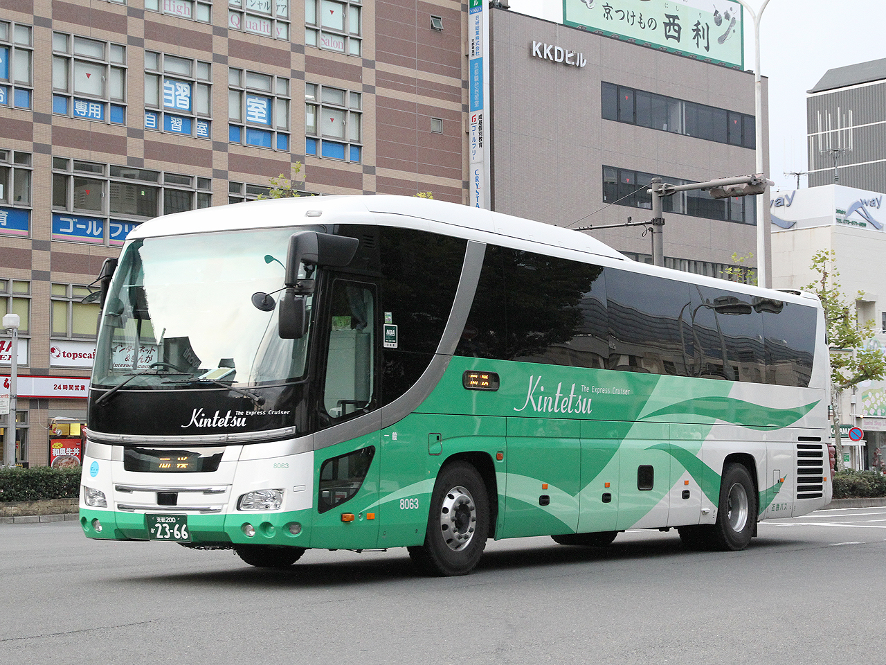 登録番号 京都200か23-66 近鉄バス㈱京都営業所所属 夜行高速用車両 2012年1月 京都駅八条口にて撮影 撮影者 Zondag2000